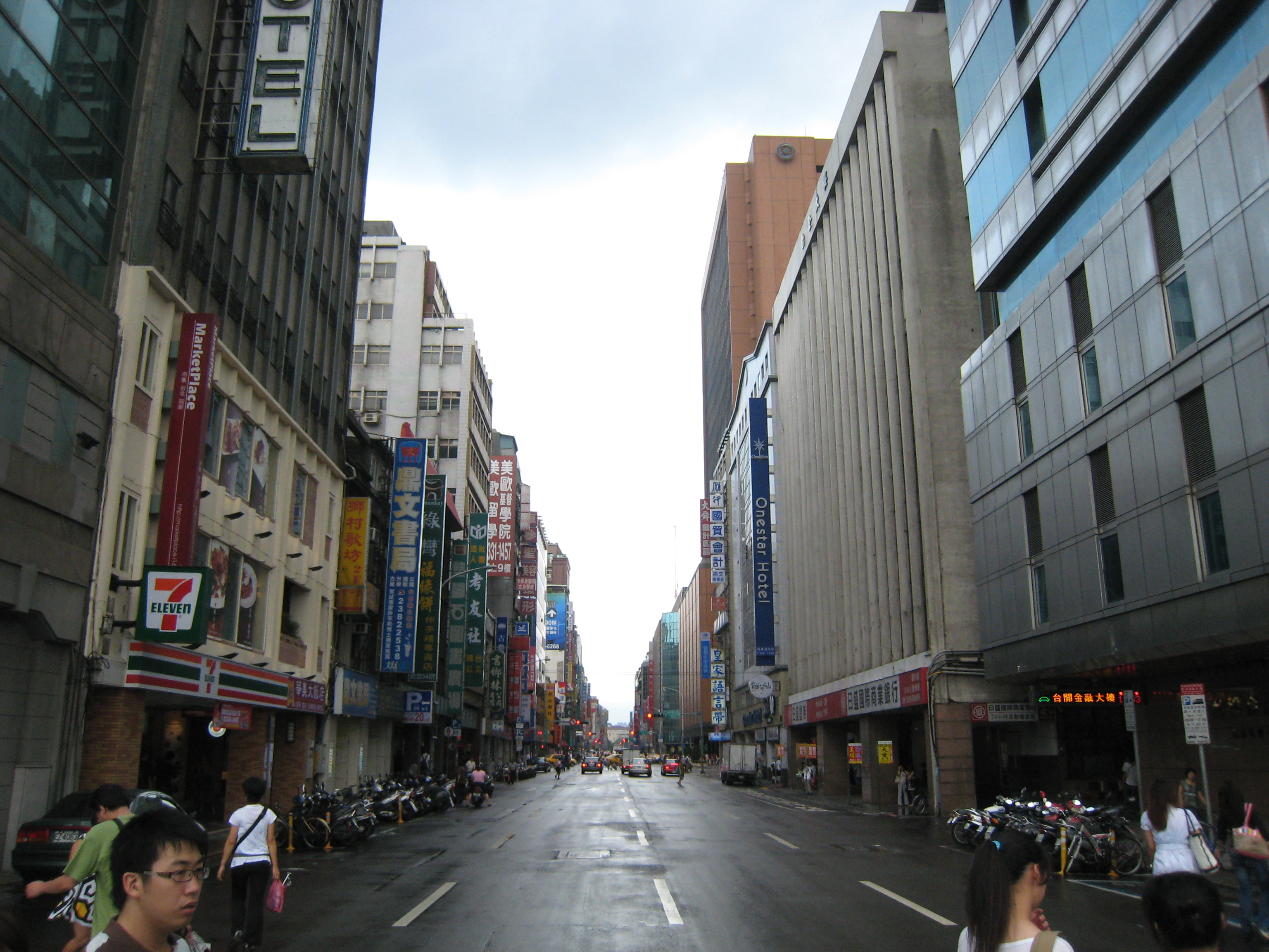 臺灣臺北市中正區重慶南路一段